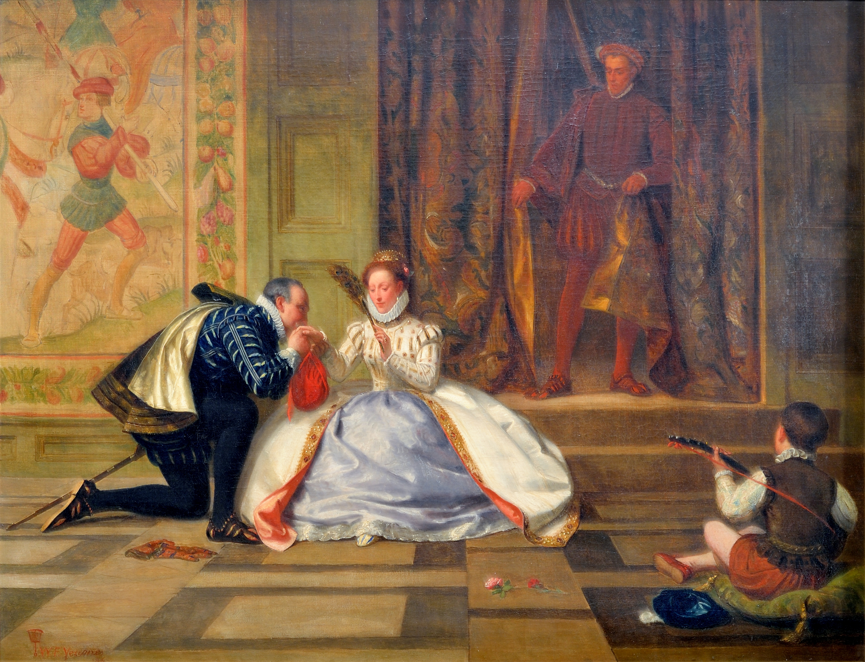 La Reine Élisabeth 1ère et Leicester [Queen Elizabeth and Leicester], par William Frederick YEAMES, œuvre exposée au Musée des beaux arts de Lyon en 2014.